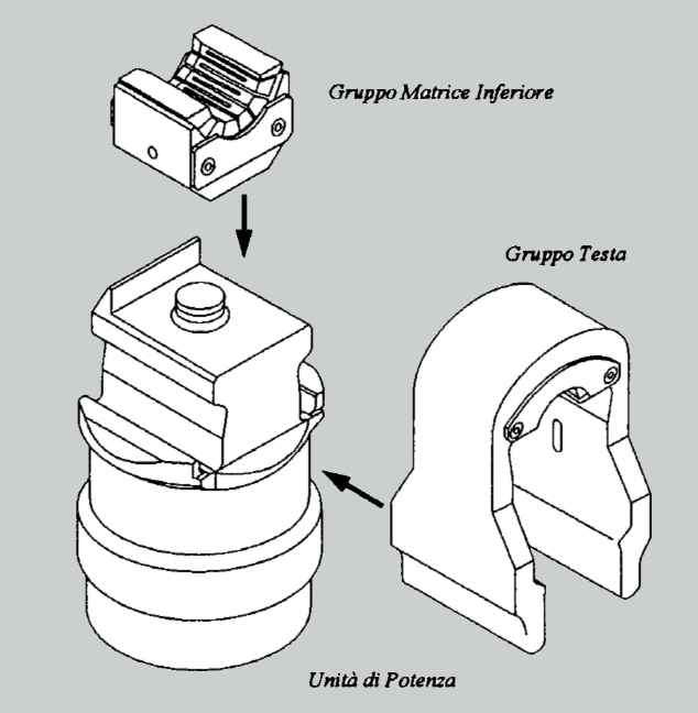 Macchina per operazioni di aggraffaggio di giunti